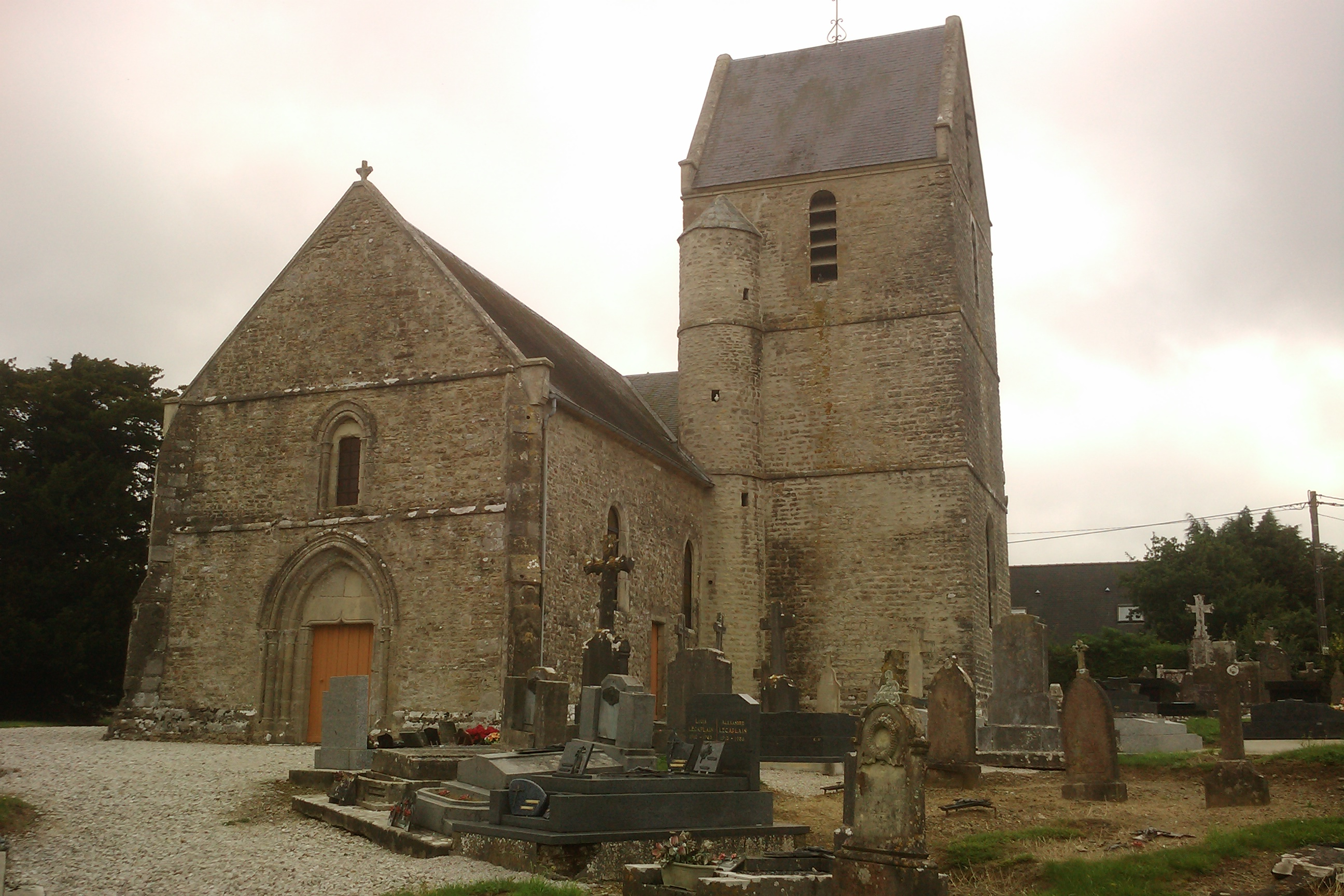 Église Saint-Vigor de Joganville